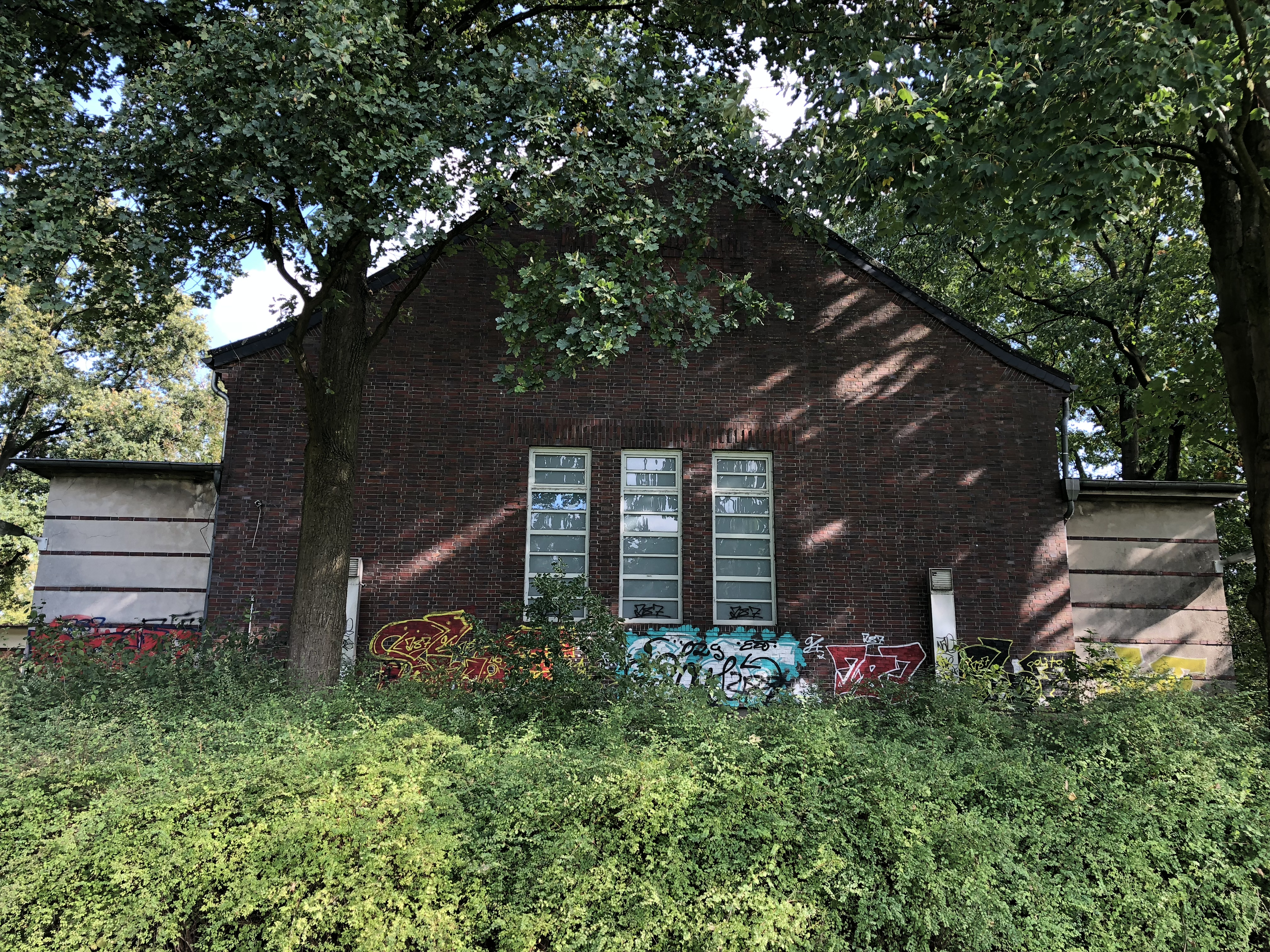 Turnhalle in Bremen, Ludwig-Jahn-Straße 6Das abgebildete Objekt ist ein geschütztes Kulturdenkmal in der Freien Hansestadt Bremen, mit der Nr. 2207 beim Landesamt für Denkmalpflege registriert.